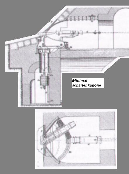 Minimalschartenkanone